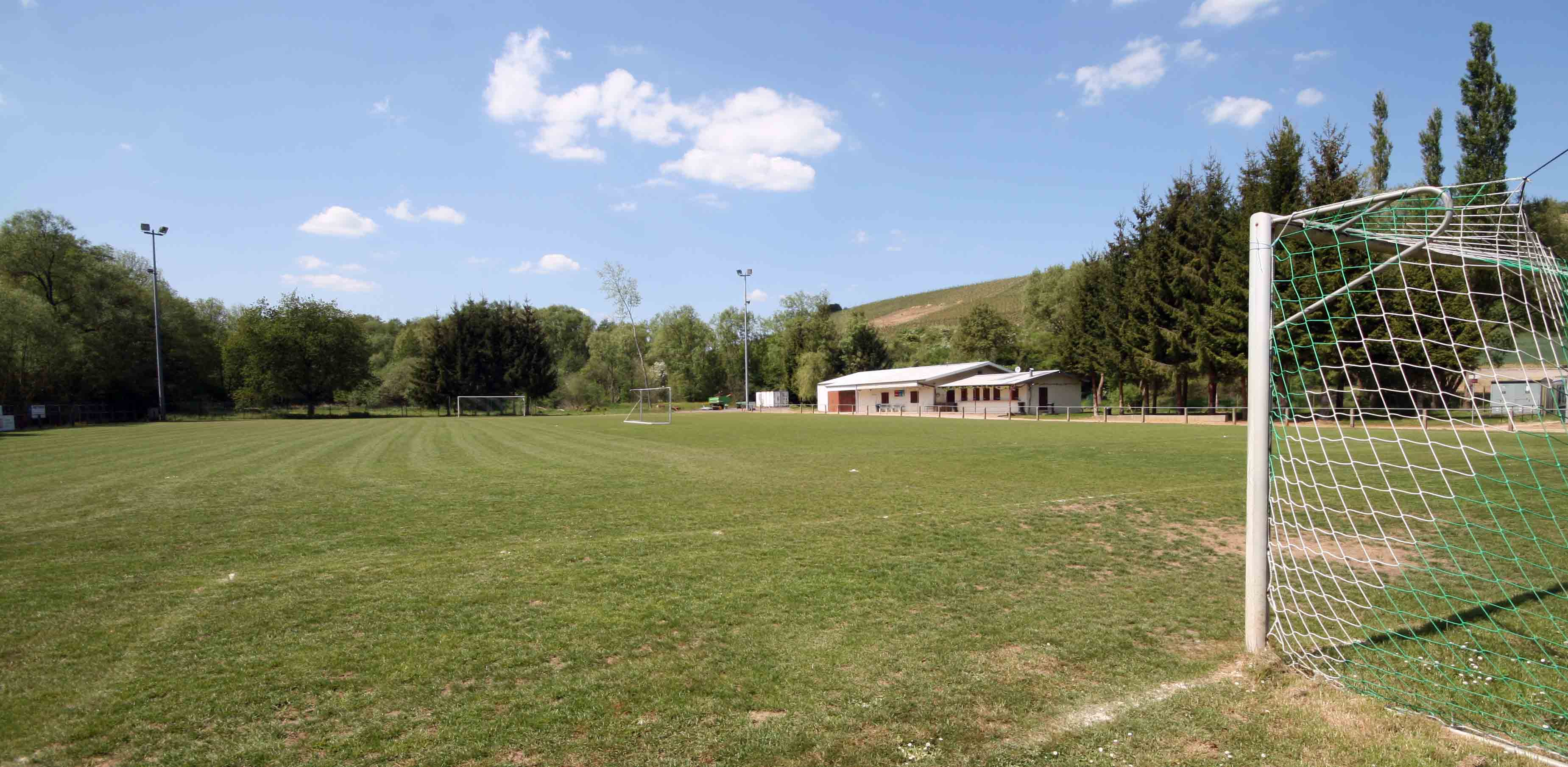 ÉIN Fterrain.